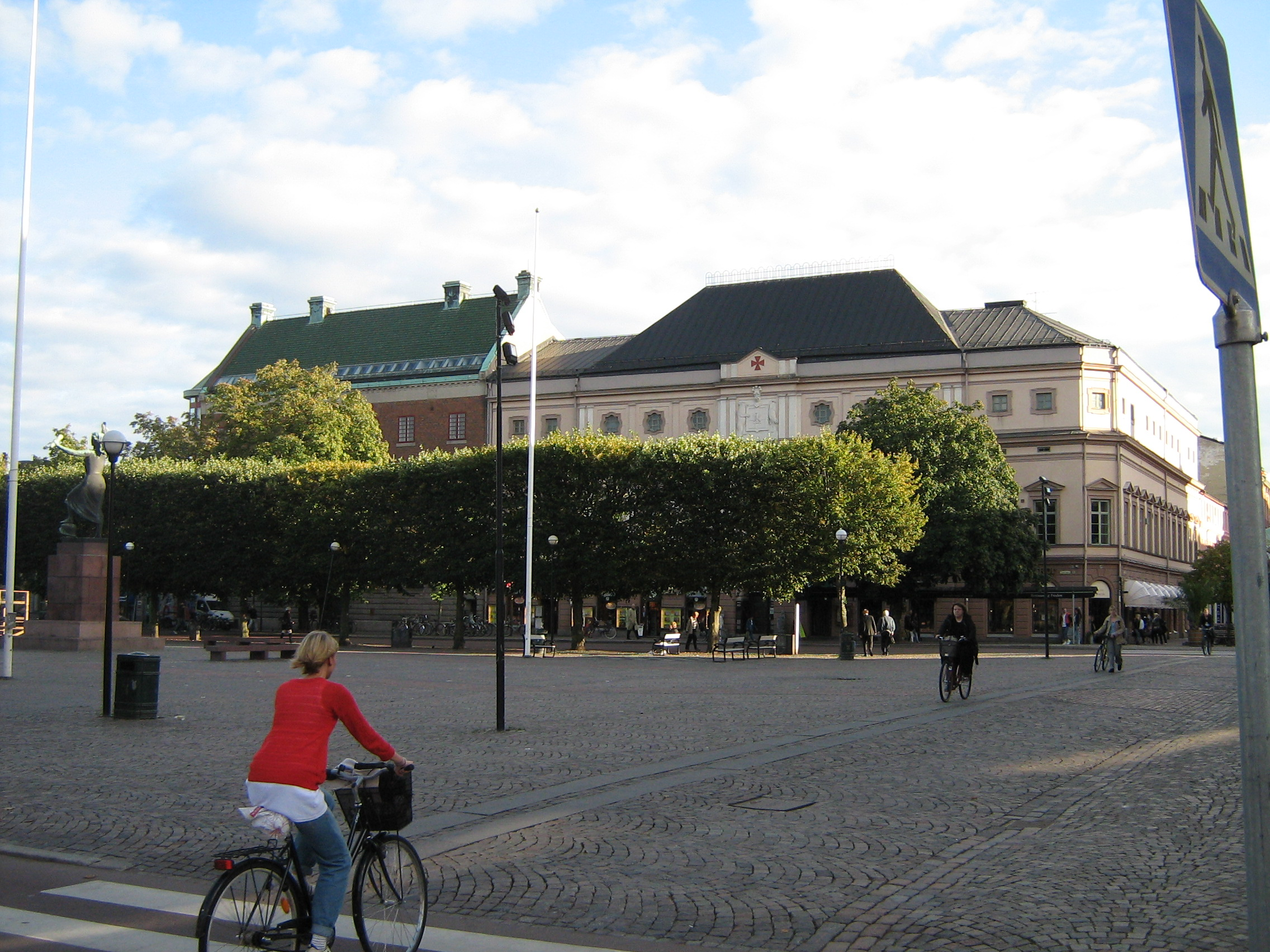 Stora torget i Karlstad med frimurarhuset bakom träden.